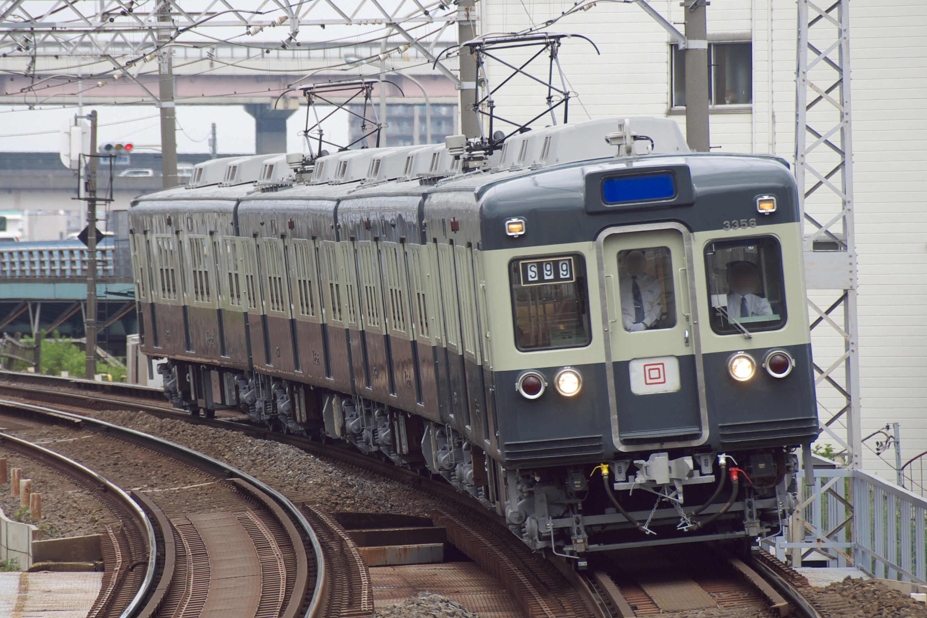 京成3300形電車の青電塗装(3356F) 京成本線: 京成関屋〜堀切菖蒲園にて撮影